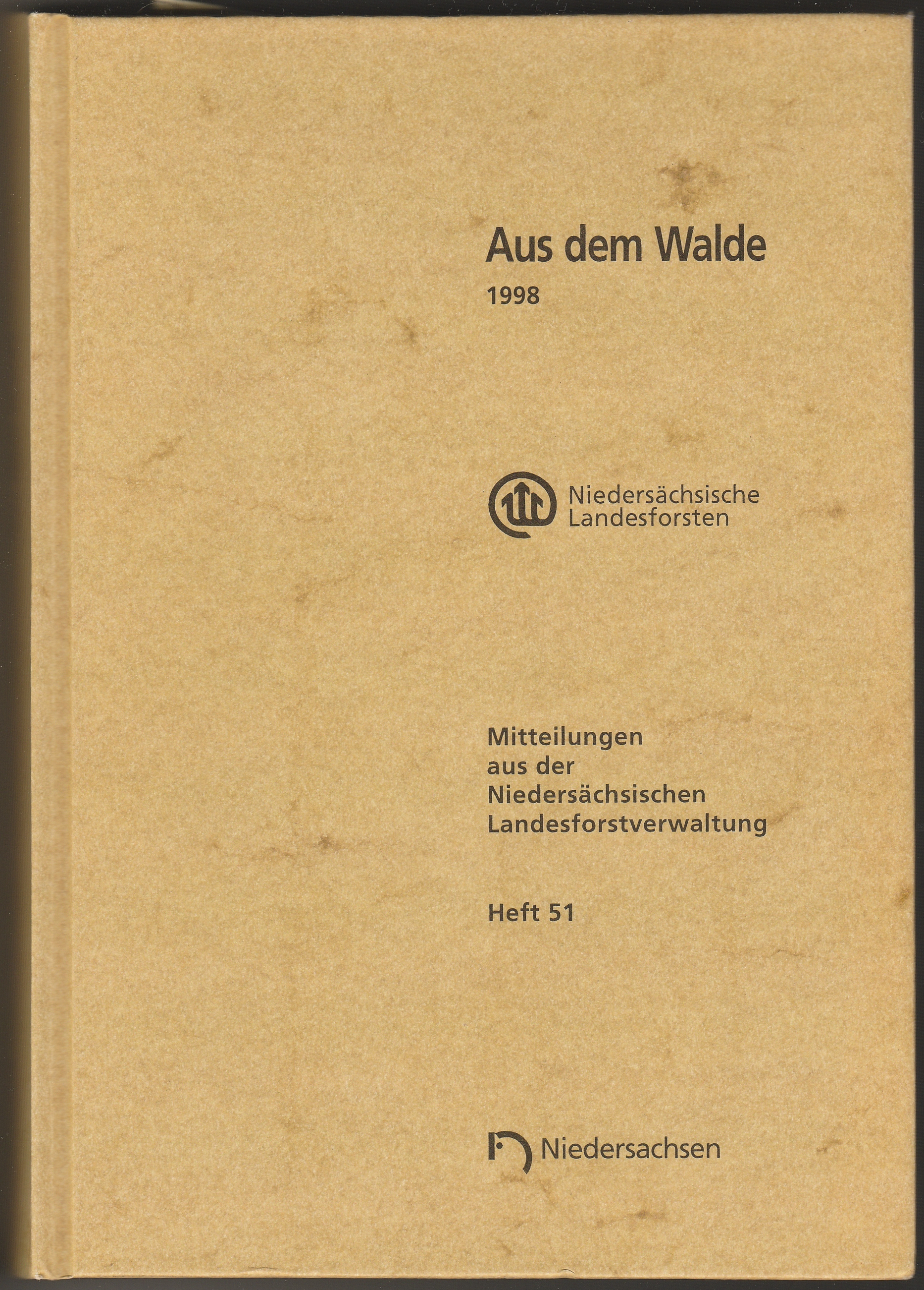 Zoltán Rozsnyay, Frank Kropp: Niedersächsische Forstliche Biographie. Ein Quellenband. Aus dem Walde (1998): Mitteilungen aus der Niedersächsischen Landesforstverwaltung (Heft 51). Buchdeckel. Niedersächsisches Ministerium für Ernährung, Landwirtschaft und Forsten (MELF), Wolfenbüttel Hardcover, 628 Seiten, 15 x 24 cm.